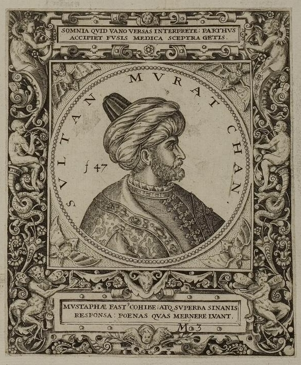 Grafik aus dem Klebeband Nr. 1 der Fürstlich Waldeckschen Hofbibliothek Arolsen Illustration aus: Georg Greblinger: Wahre Abbildungen der Türckischen Kayser vnd Persischen Fürsten / so wol auch anderer Helden und Heldinnen von dem Osman / biß auf den andern Mahomet. Johann Ammon, Frankfurt 1648 Motiv: "Sultan Murat Chan" (Murad III.)